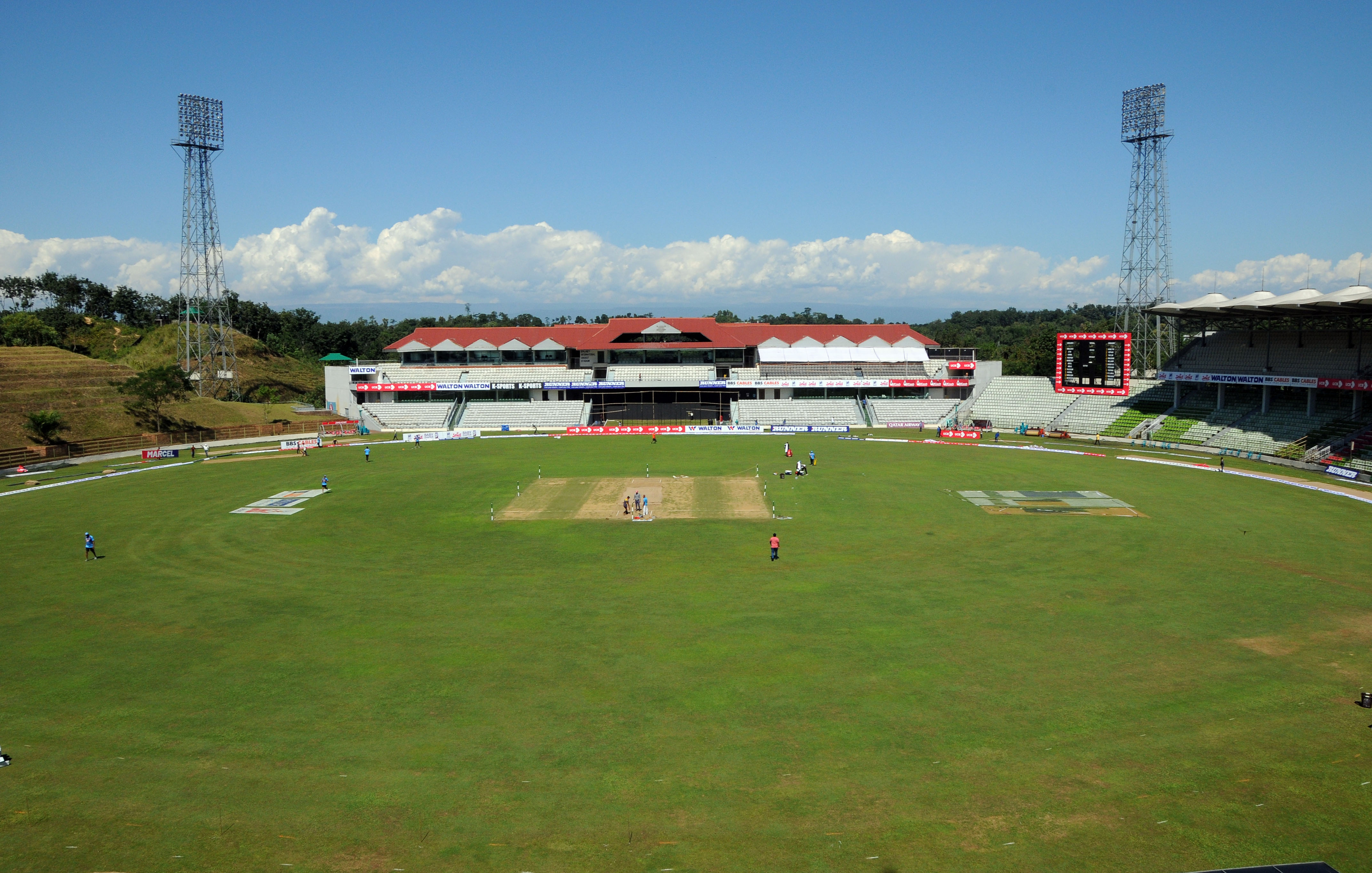 প্রথম আন্তর্জাতিক টেস্ট ম্যাচের জন্য প্রস্তুত সিলেট আন্তর্জাতিক ক্রিকেট স্টেডিয়াম।